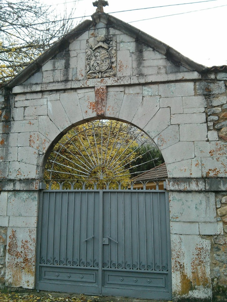 Anitguo Hospital de peregrinos en Puebla de Lillo